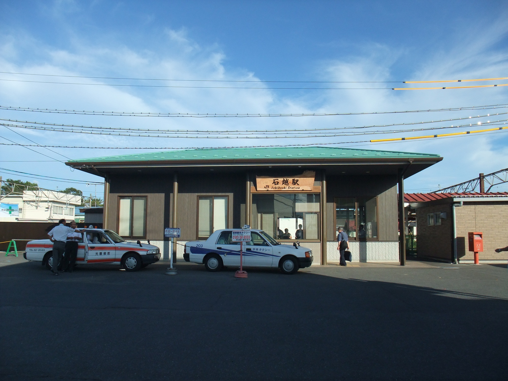 石越駅新駅舎